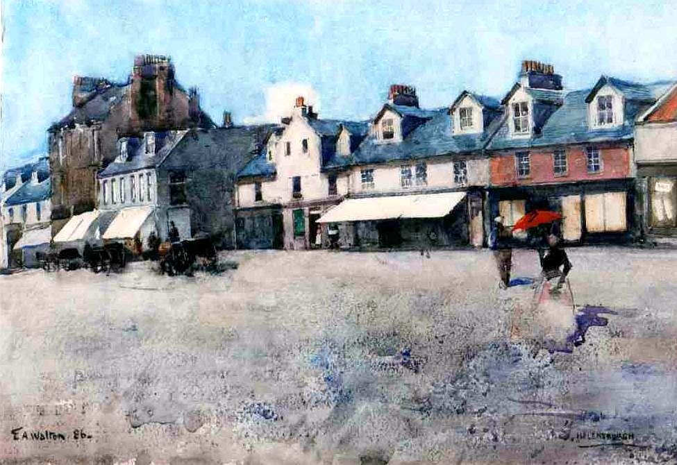 Helensburgh